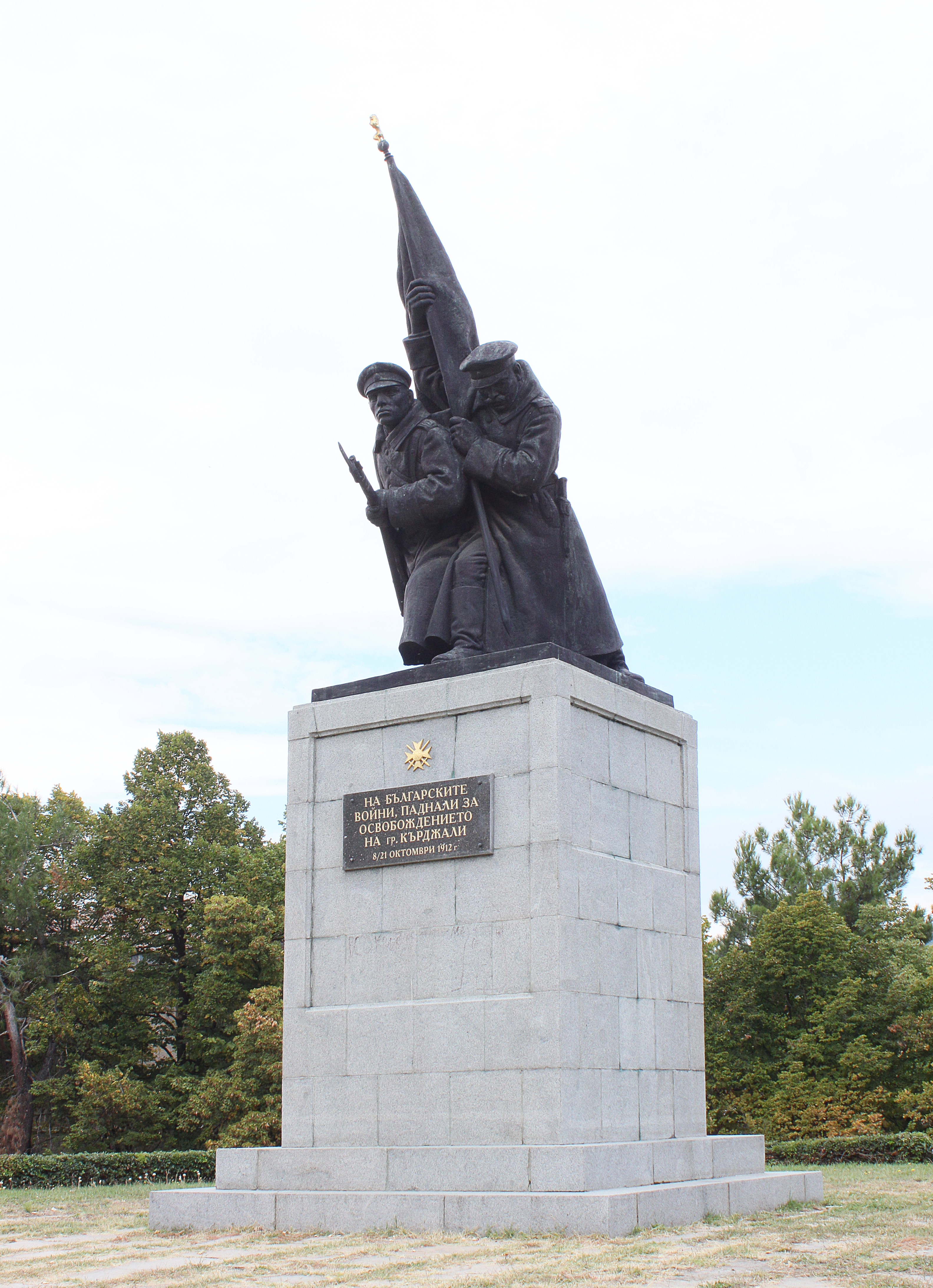 Kardschali; Bulgarien